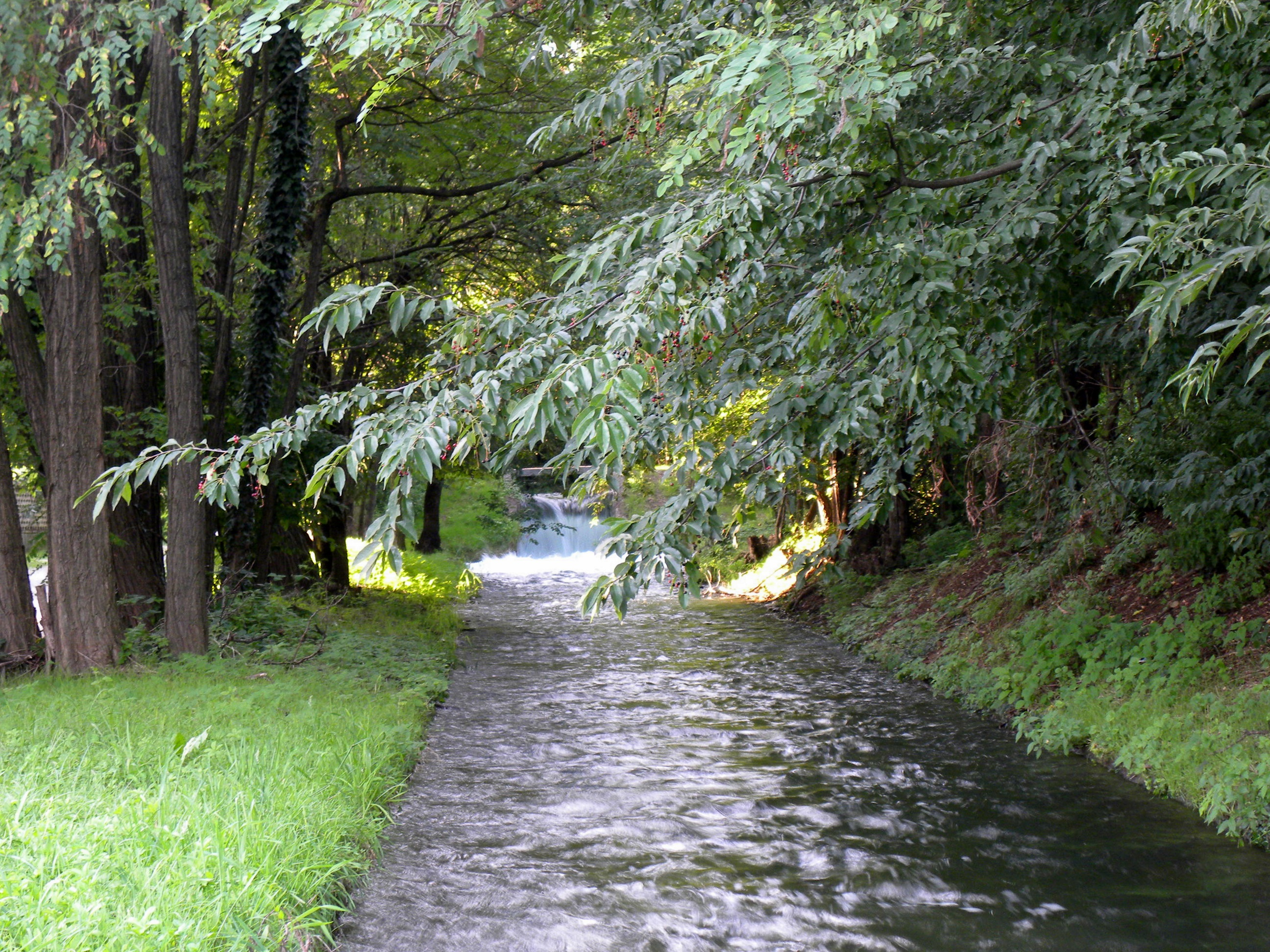 Un tratto del canale Villoresi ad Arluno